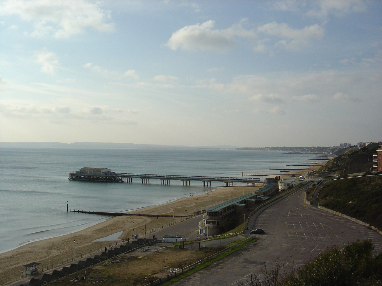 Boscombe Pier